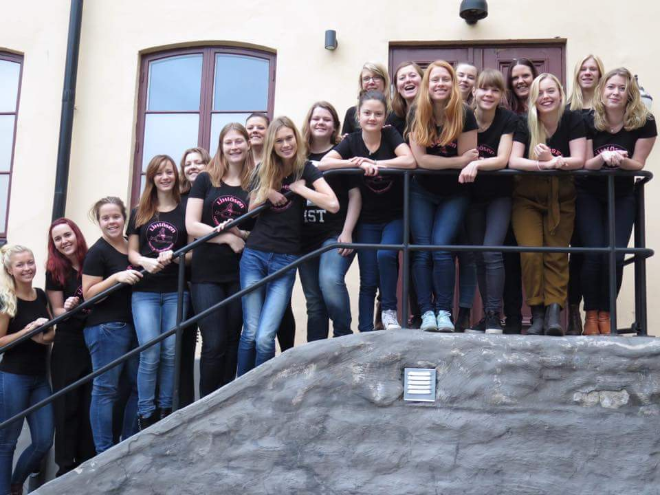 LiHtösen 2015